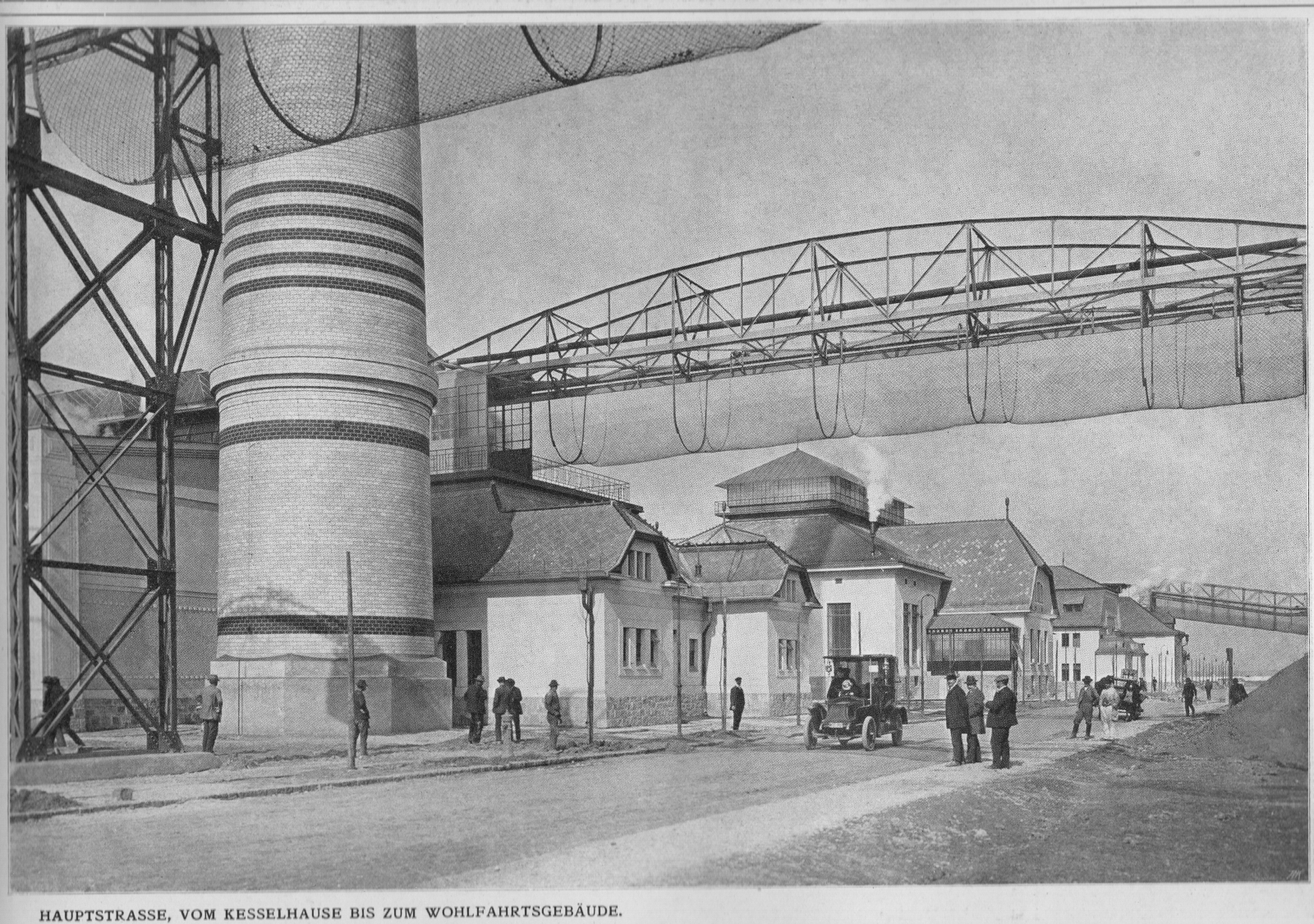 Städtische Gaswerk Leopoldau: Hauptstrasse, vom Kesselhause bis zum Wohlfahrtsgebäude